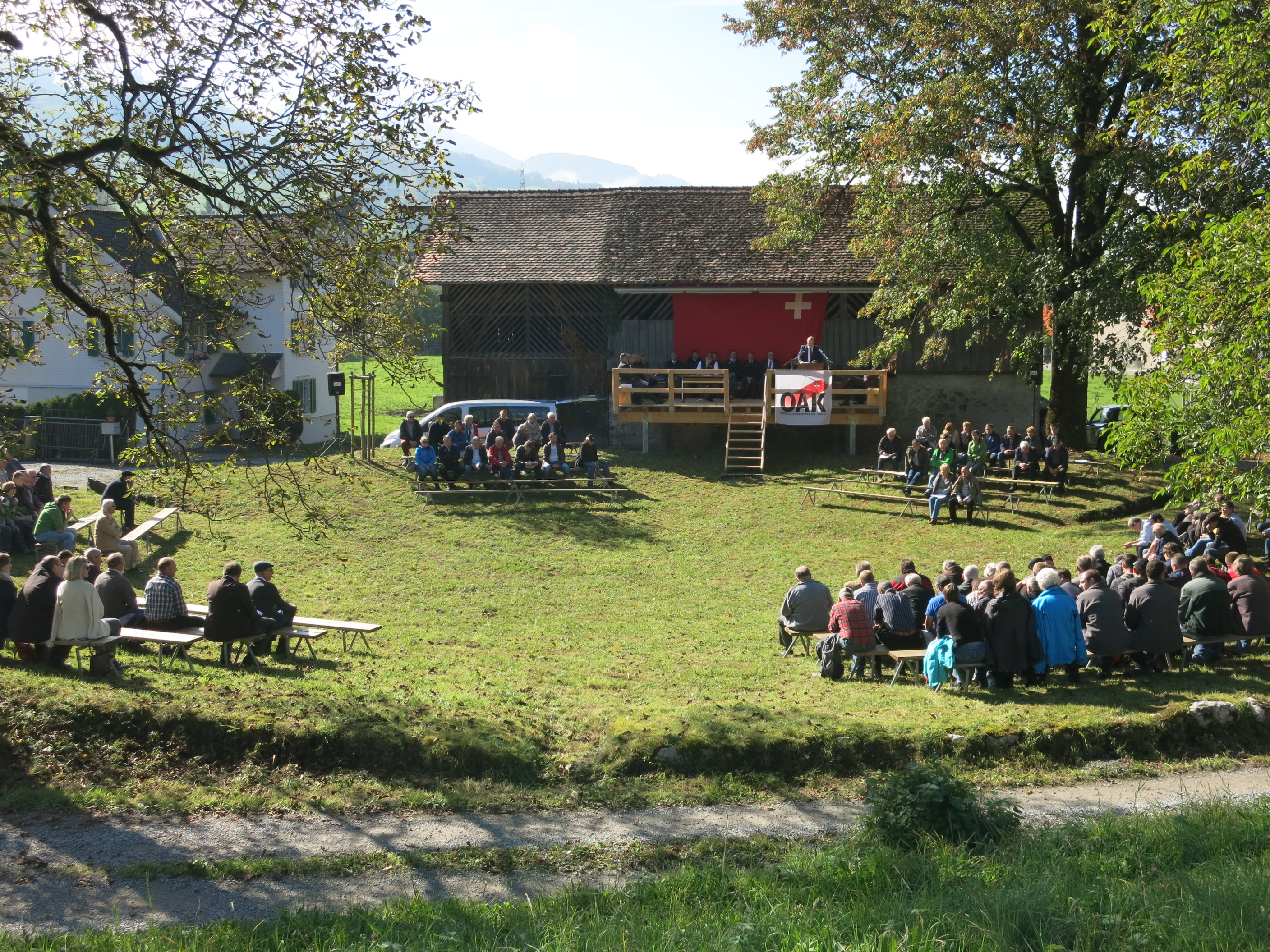 Oberallmeindkorporation Schwyz SZ, Schweiz